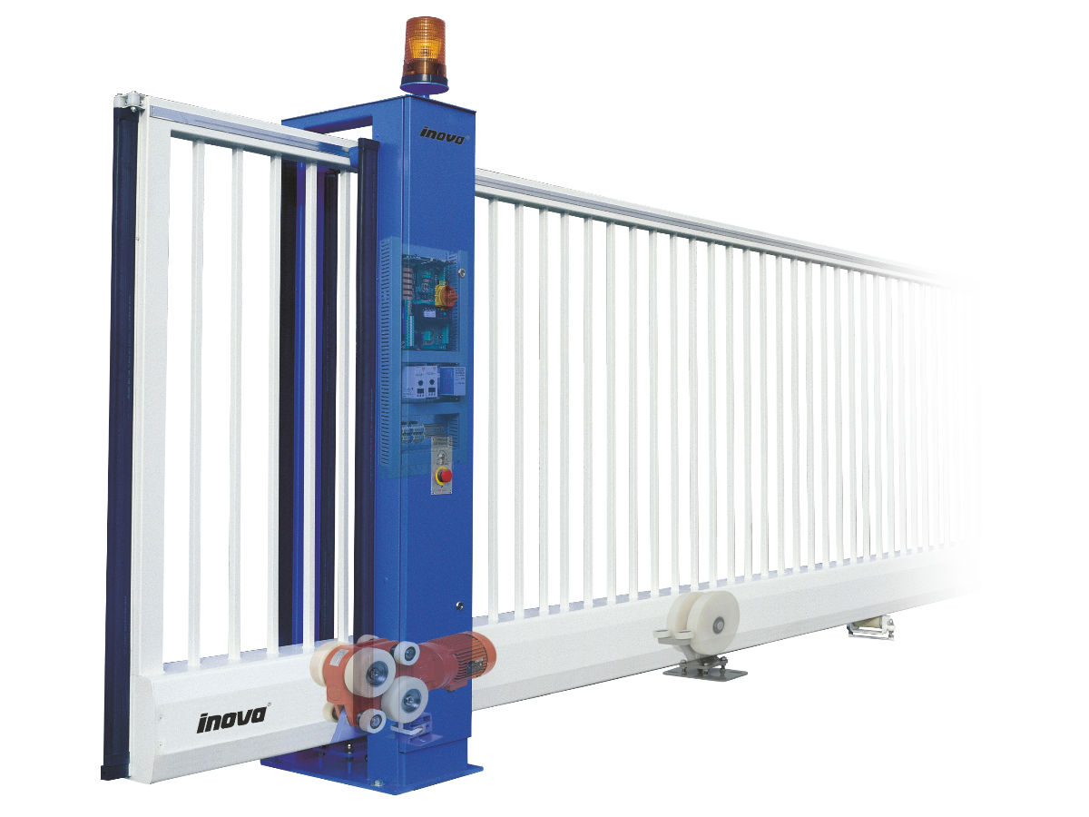 Eine symbolische Darstellung des patentierten Antriebes.